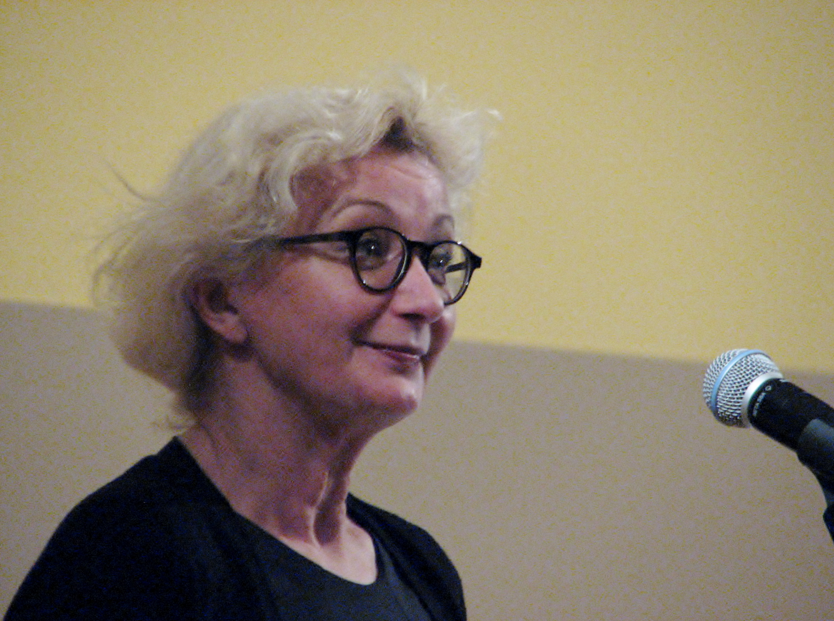 Anu Kalm konkursi 25 kauneimat Eesti raamatut ja 5 kauneimat lasteraamatut 2013 autasustamisel